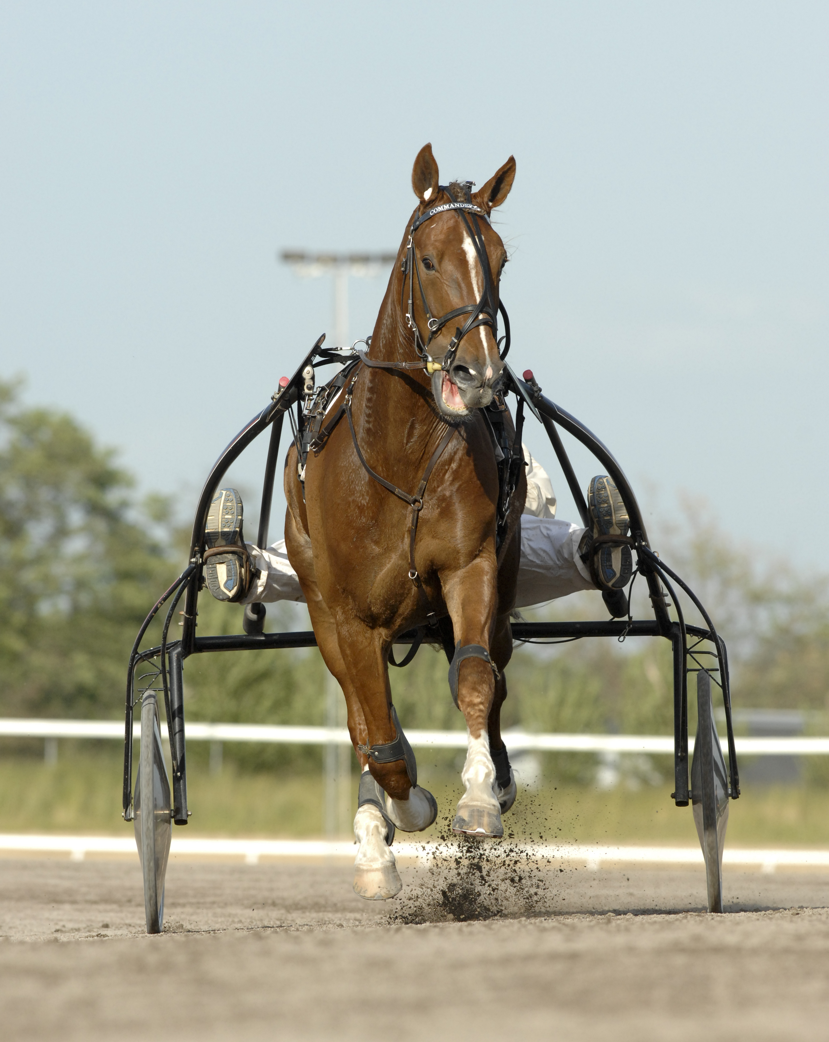 Travaren Commander Crowe i träning.